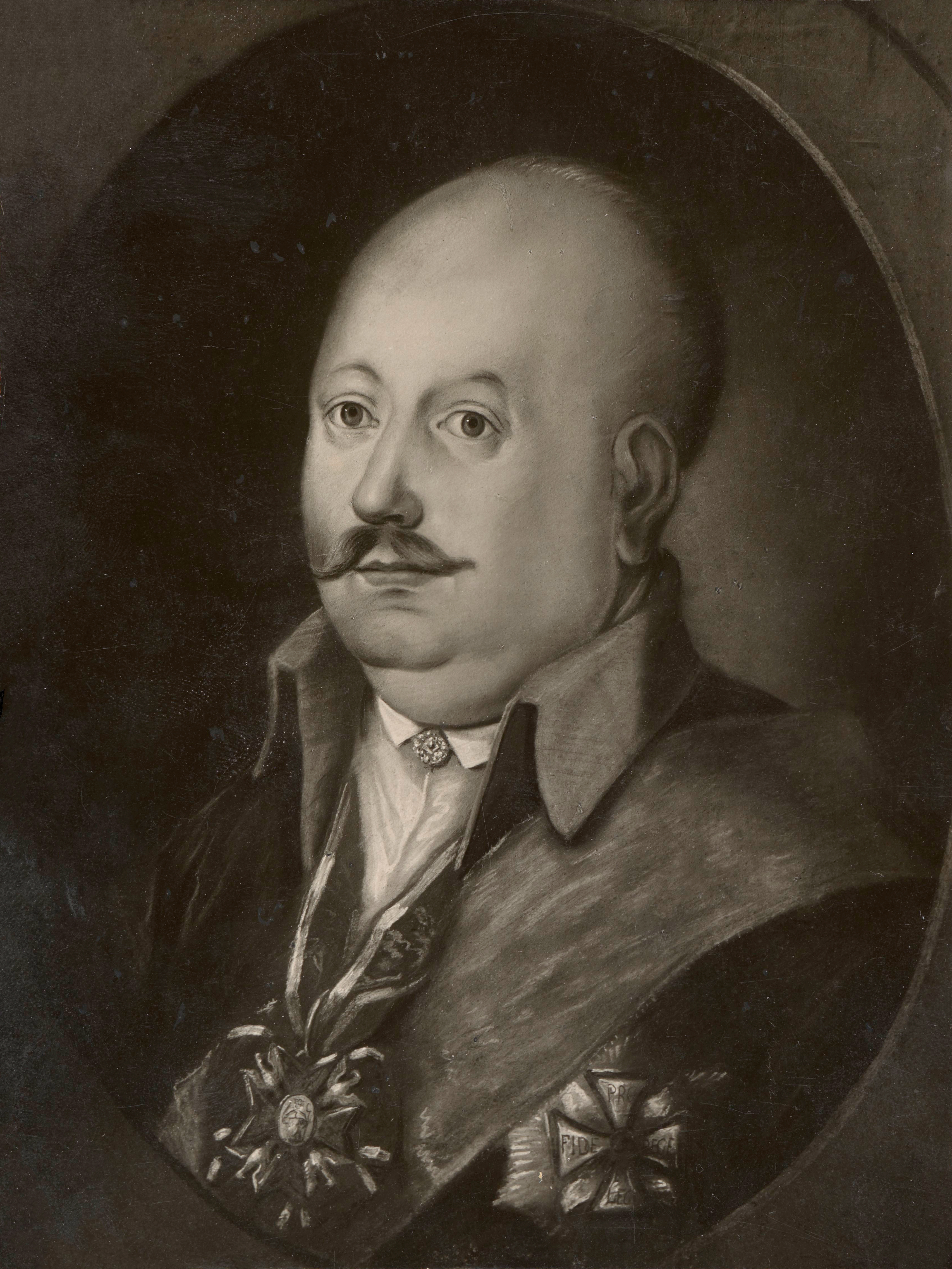 Беларуская (тарашкевіца): Партрэт Мікалая Лапацінска (Mikałaj Łapacinski)